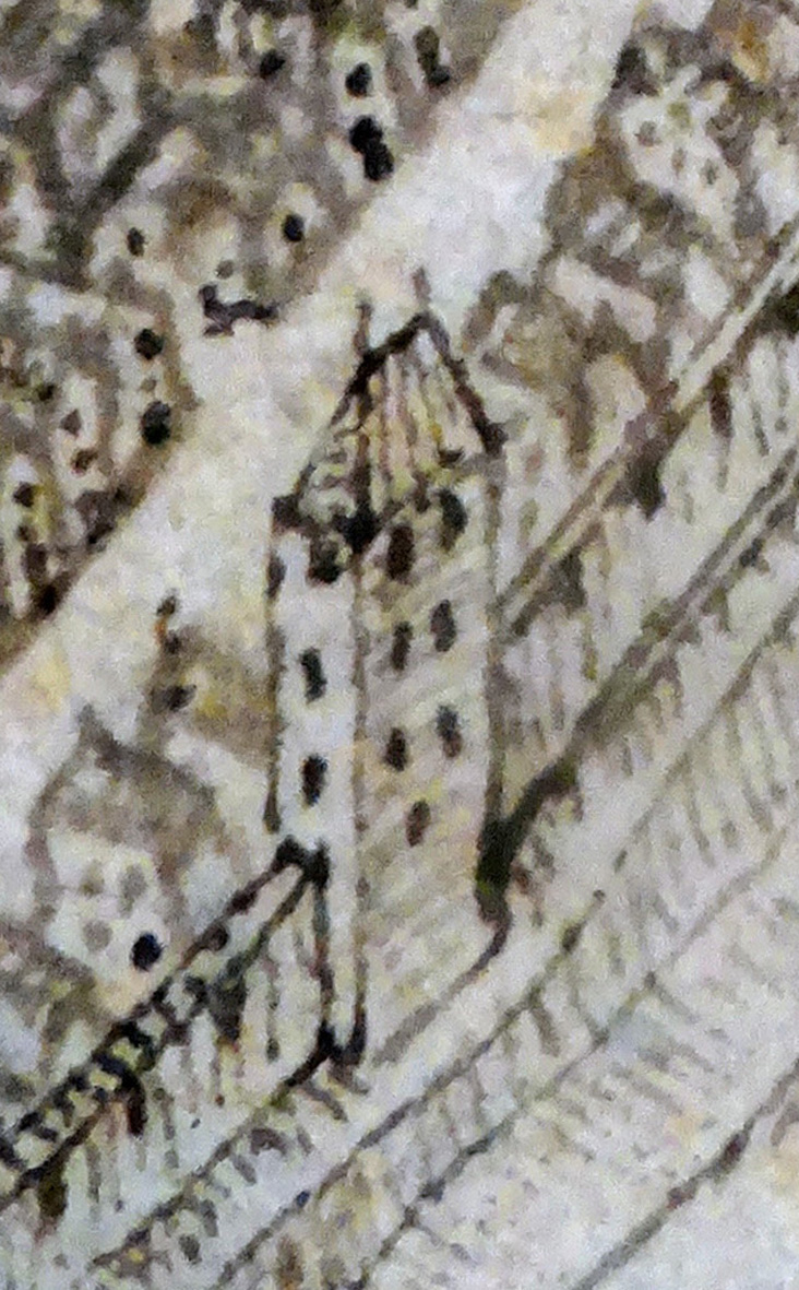 Henker- oder Folterturm, Worms. Detail aus: Peter Hamman: Statt Wormbß wie selbige 1631 vor dem Schwedischen Ruin der Vorstätt [...] verblieben. Stadtarchiv Worms, Abt. 1B, Nr. 48.